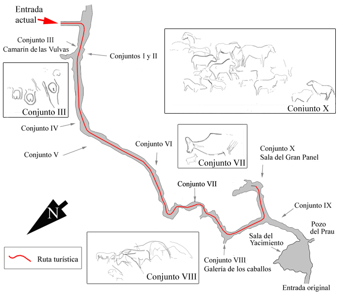 Plano de la cueva de Tito Bustillo en Ribadesella, Asturias